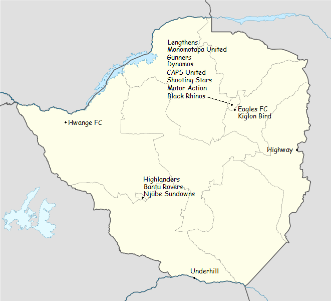 Equipas do campeonato de zimbabwe de futebol : temporada 2009 ;)